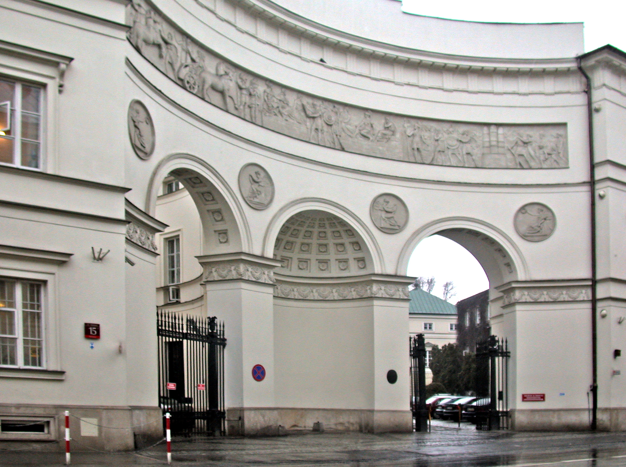 Varsavia, Palazzo Pac (Pałac Paca) sulla via Miodowa, ingresso curvilineo.